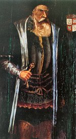 D. Garcia de Noronha, 3º vice-rei da Índia